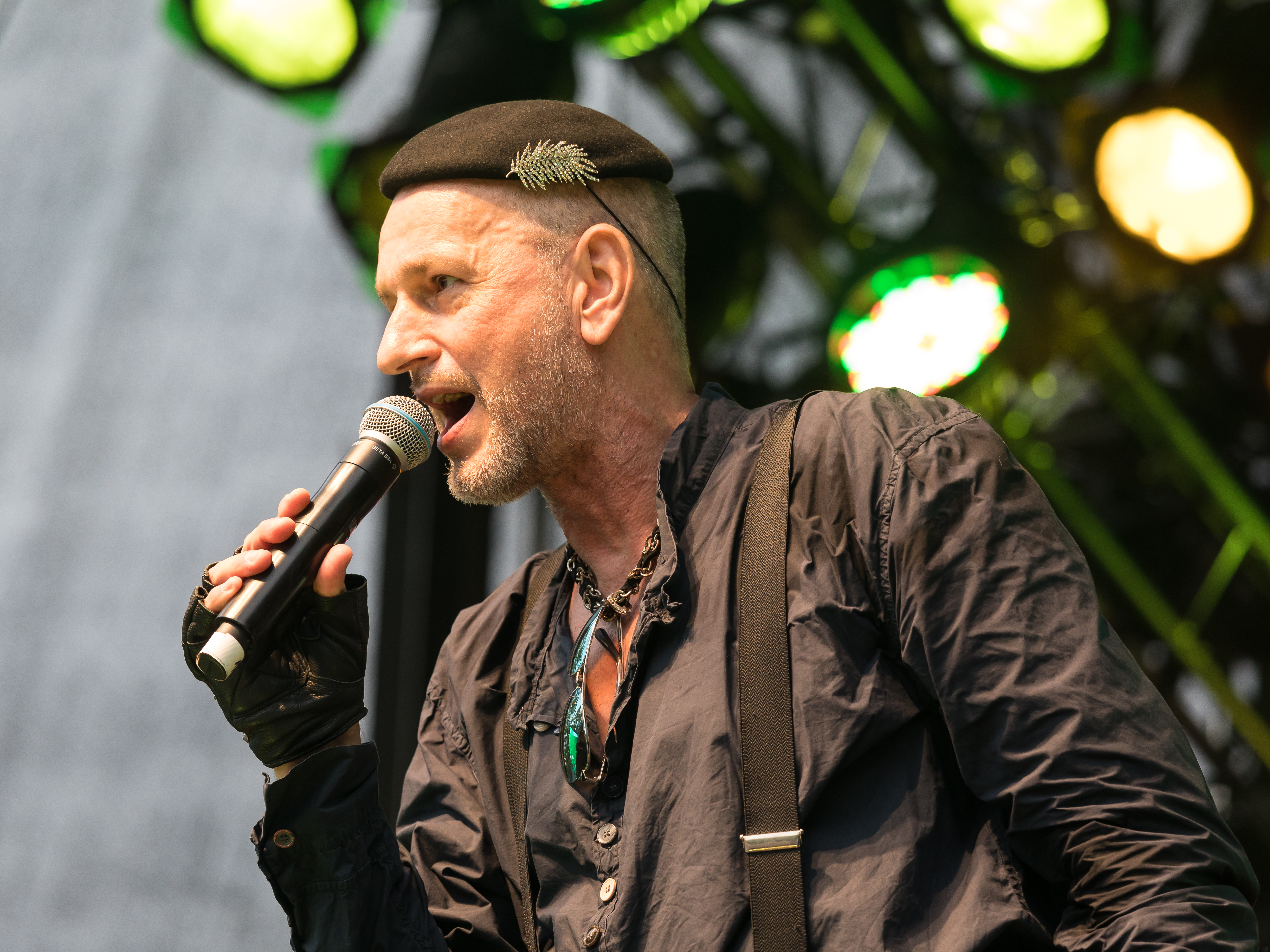 ColognePride 2019-Samstag-Hauptbühne-1940-Part of the Art - Carsten Düsener und Stephan Runge